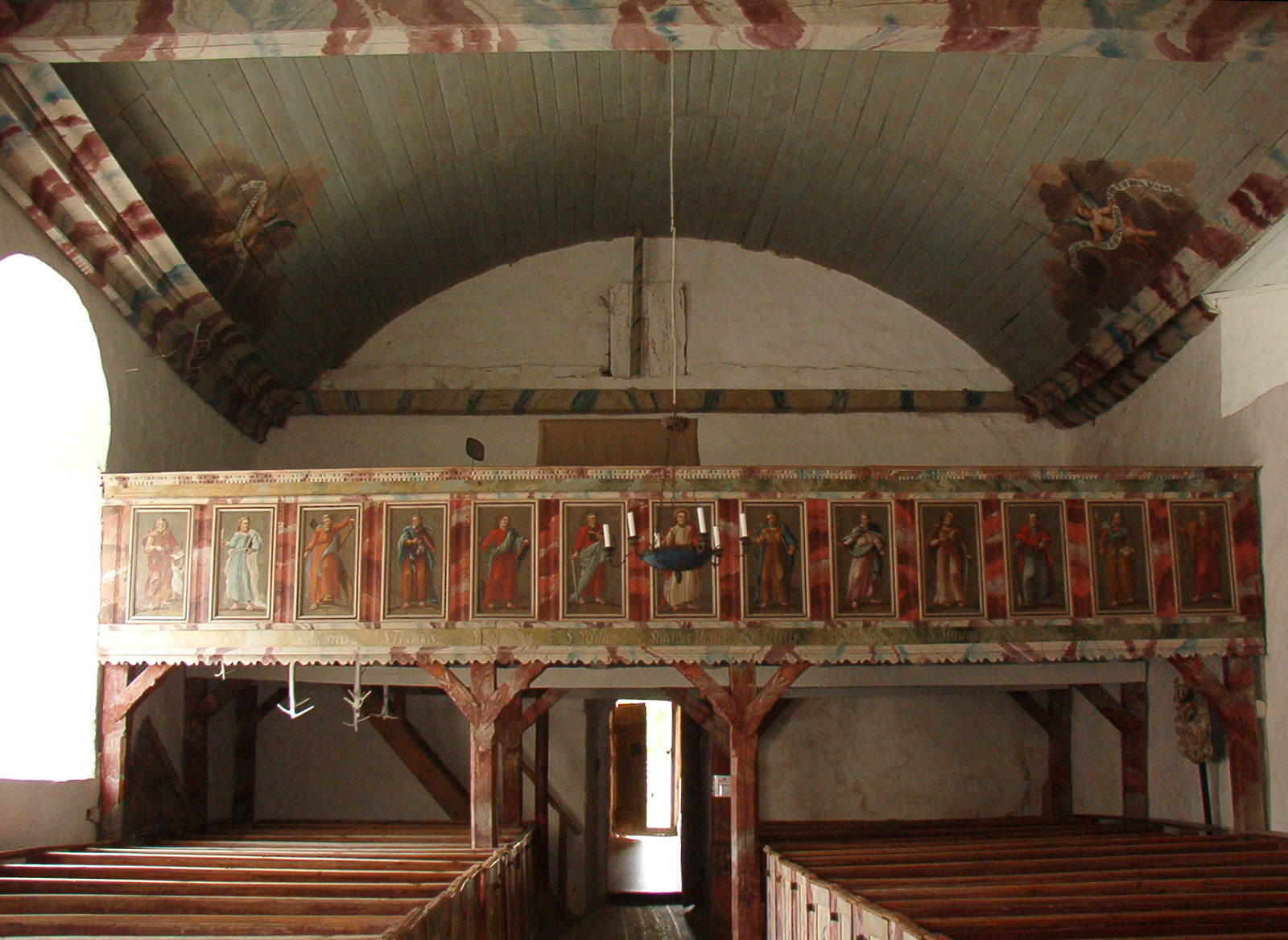 Altergång, Läktare, från altaret.